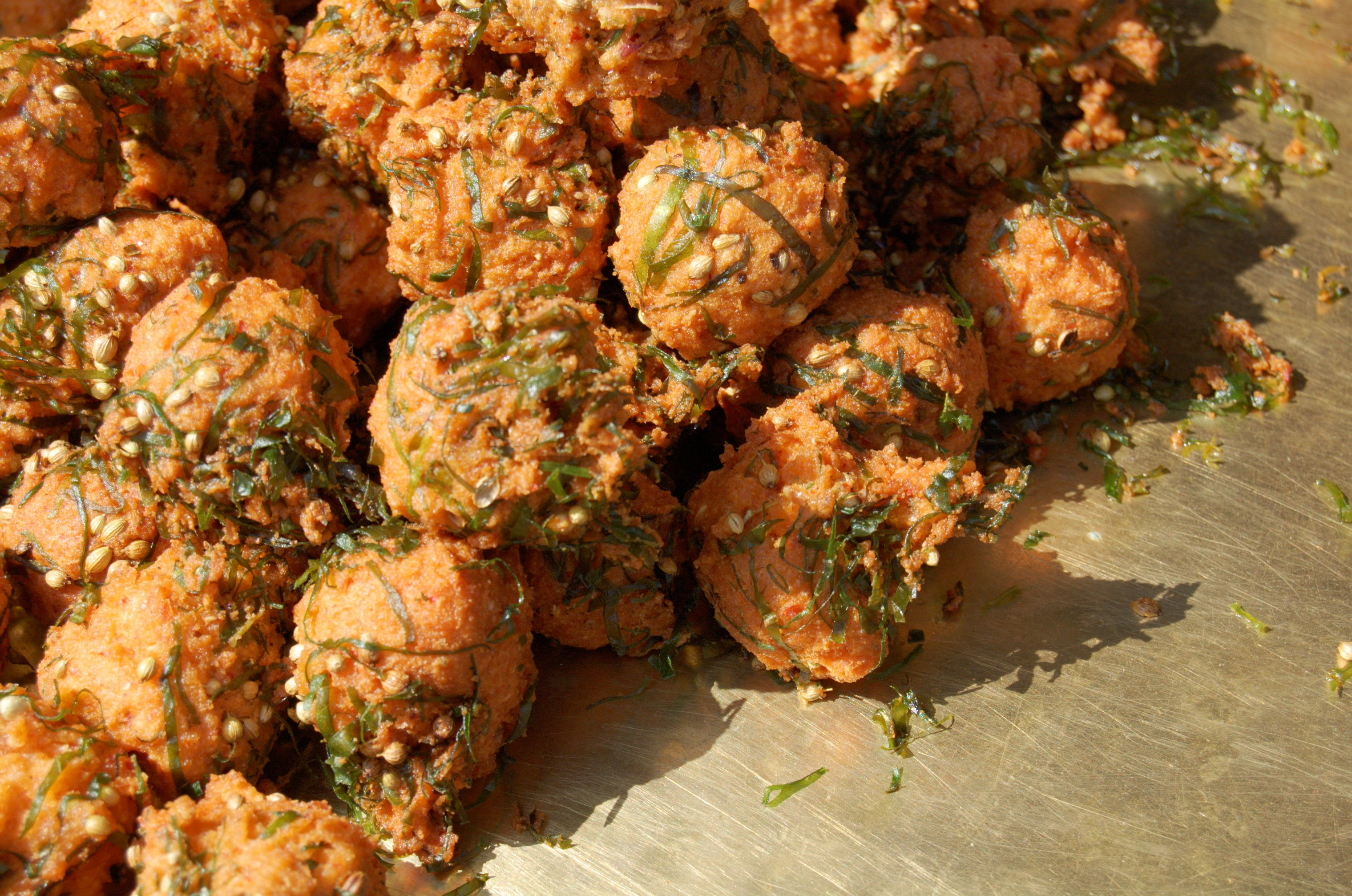 India, Day 7